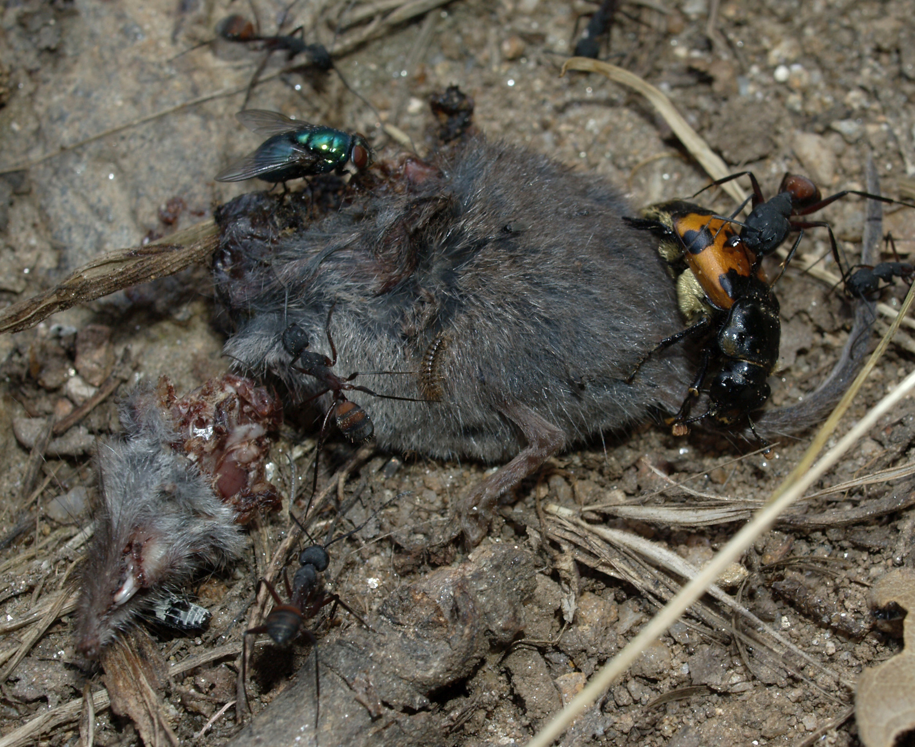 Cadáver de musaraña indeterminada (Soricidae) rodeada de carroñeros, entre los que destacan un escarabajo del género Nicrophorus y una mosca del género Lucilia. Se ve a la izquierda otro escarabajo , probablemente también de la familia Silphidae, una larva peluda, quizá de la misma familia y numerosas hormigas, seguramente Camponotus. Losar de la Vera, Cáceres, España.